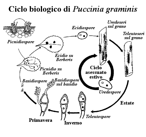 Ciclo biologico di Puccina graminis tradotto in italiano